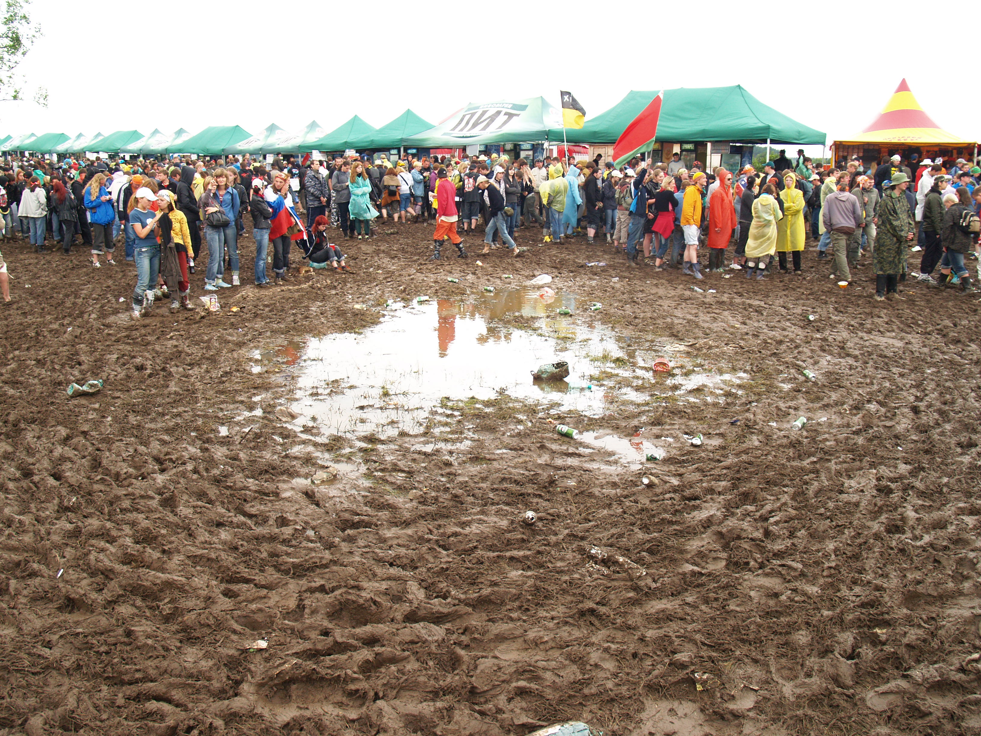 Нашествие 2008 последствия дождя